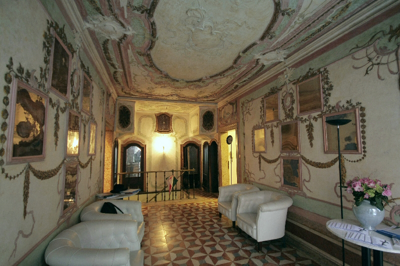 Intérieur du casino Vernier